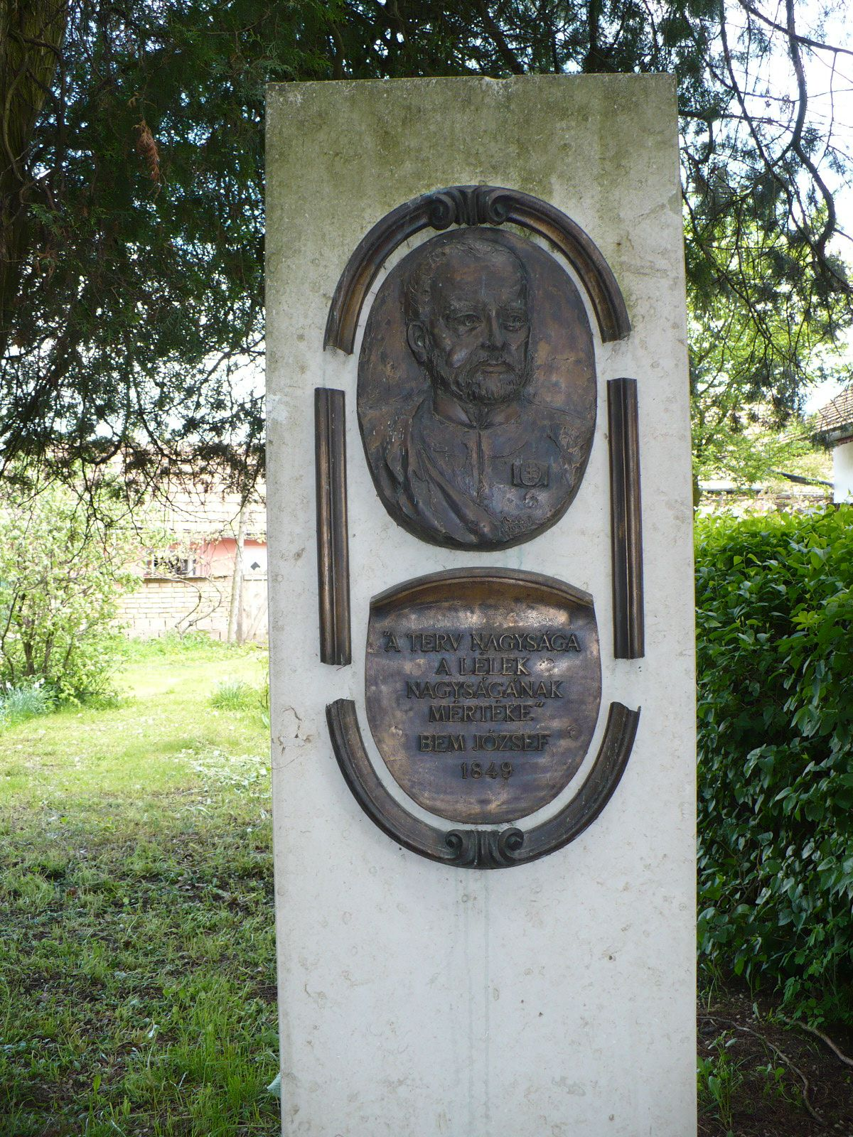 Bem József emlékműve Fehéregyházán.